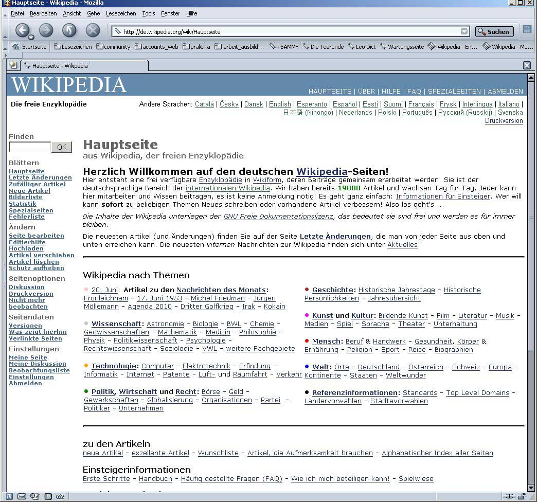 Screenshot der deutschen Wikipedia Hauptseite vom 20.06.2003 - 19000 Artikel